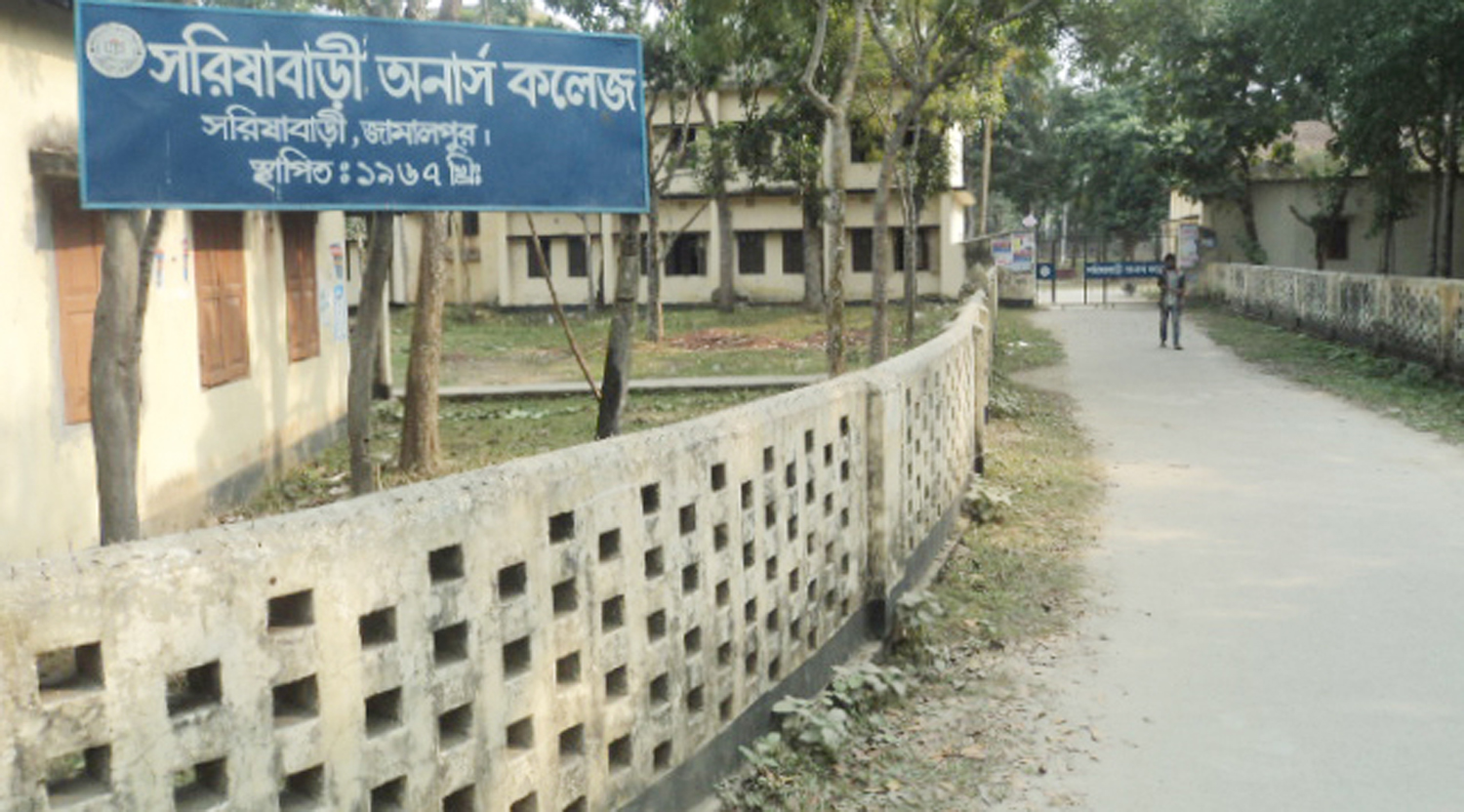 সরিষাবাড়ী কলেজ প্রবেশপথ